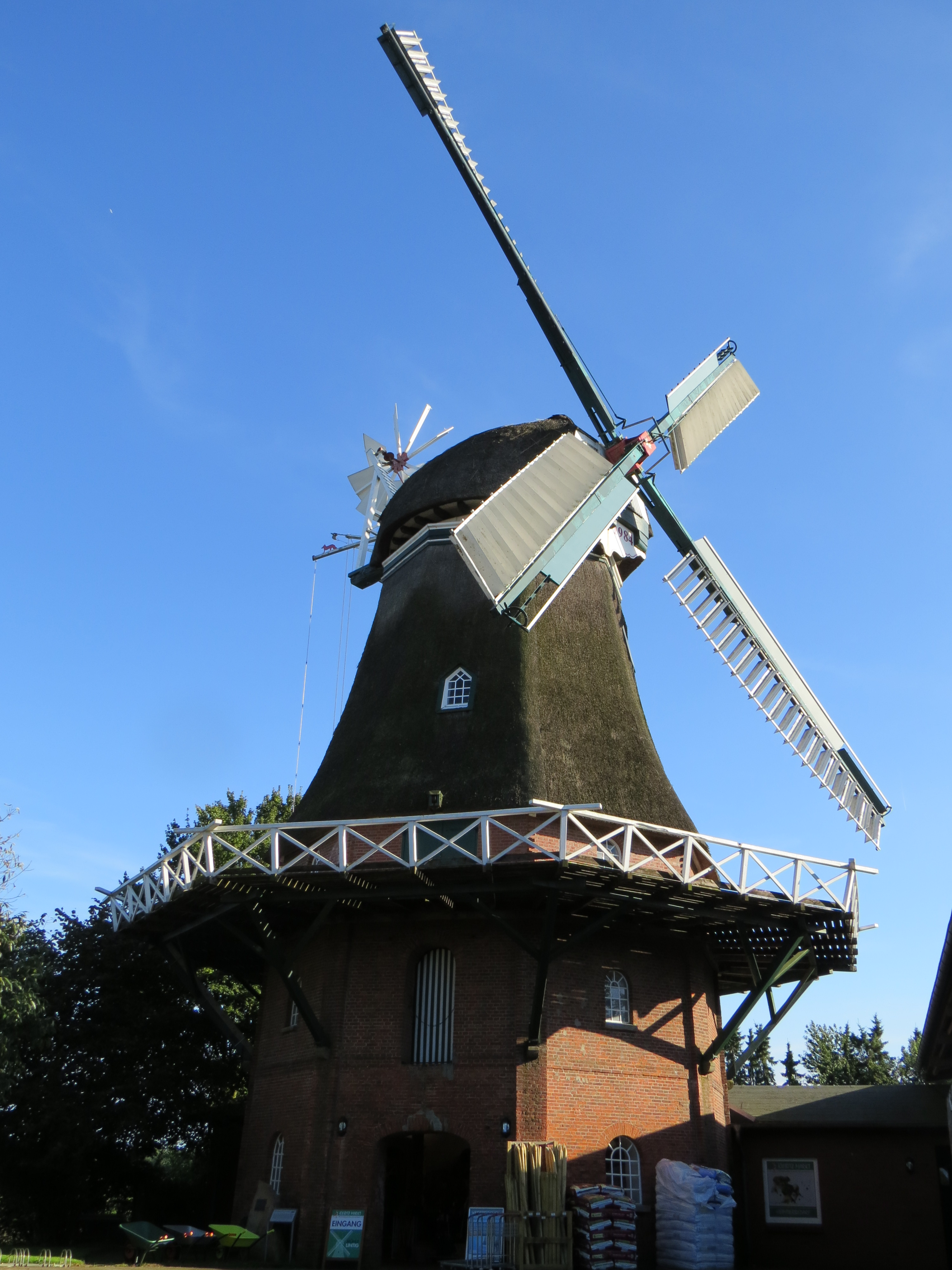 Windmühle Lintig, Gemeinde Geestland, Landkreis Cuxhaven, Niedersachsen